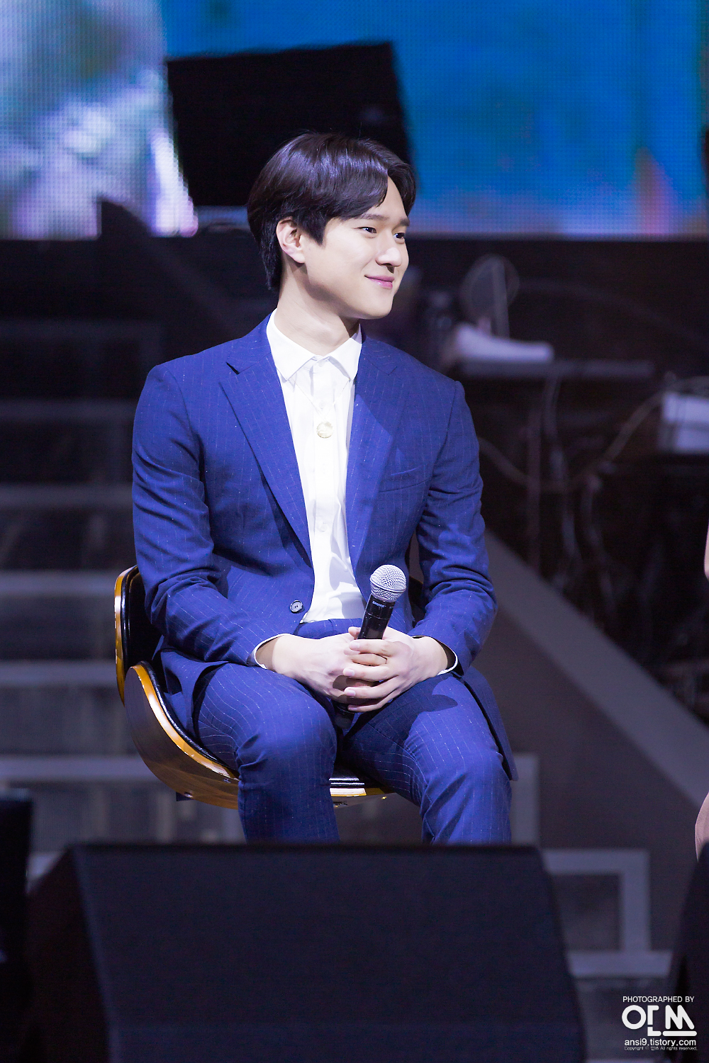 160305 응답하라 1988 콘서트